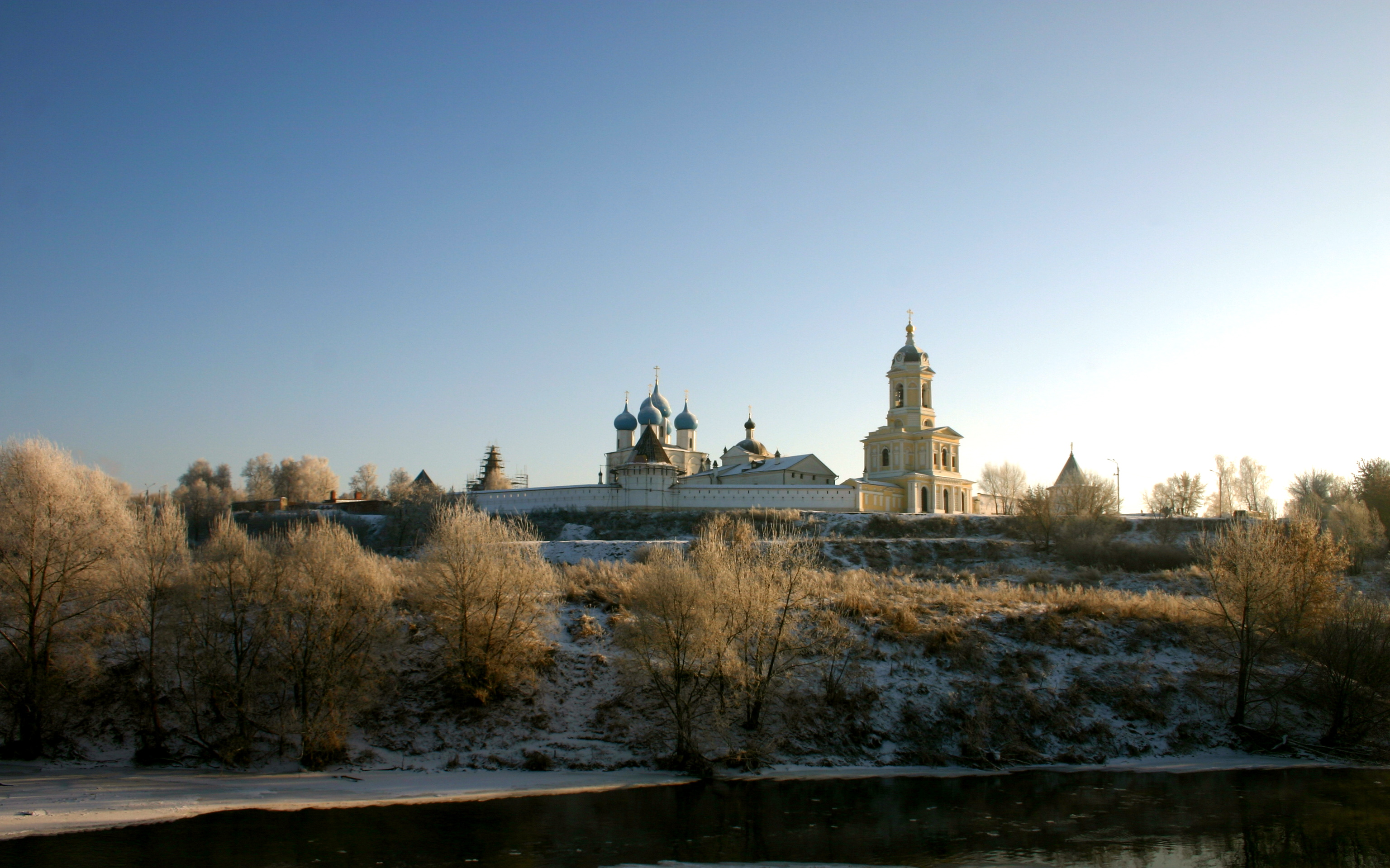 Высоцкий монастырь, Vysotsky Monastery